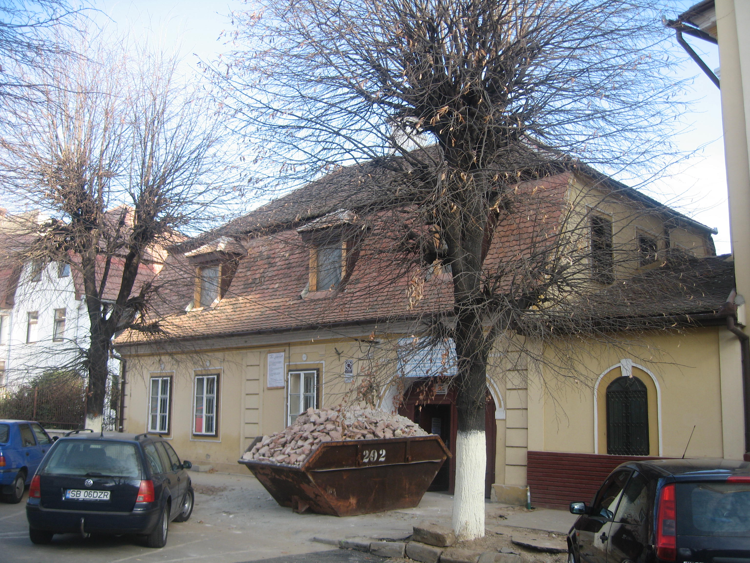 Casa parohială a Bisericii Buna Vestire din Sibiu 02